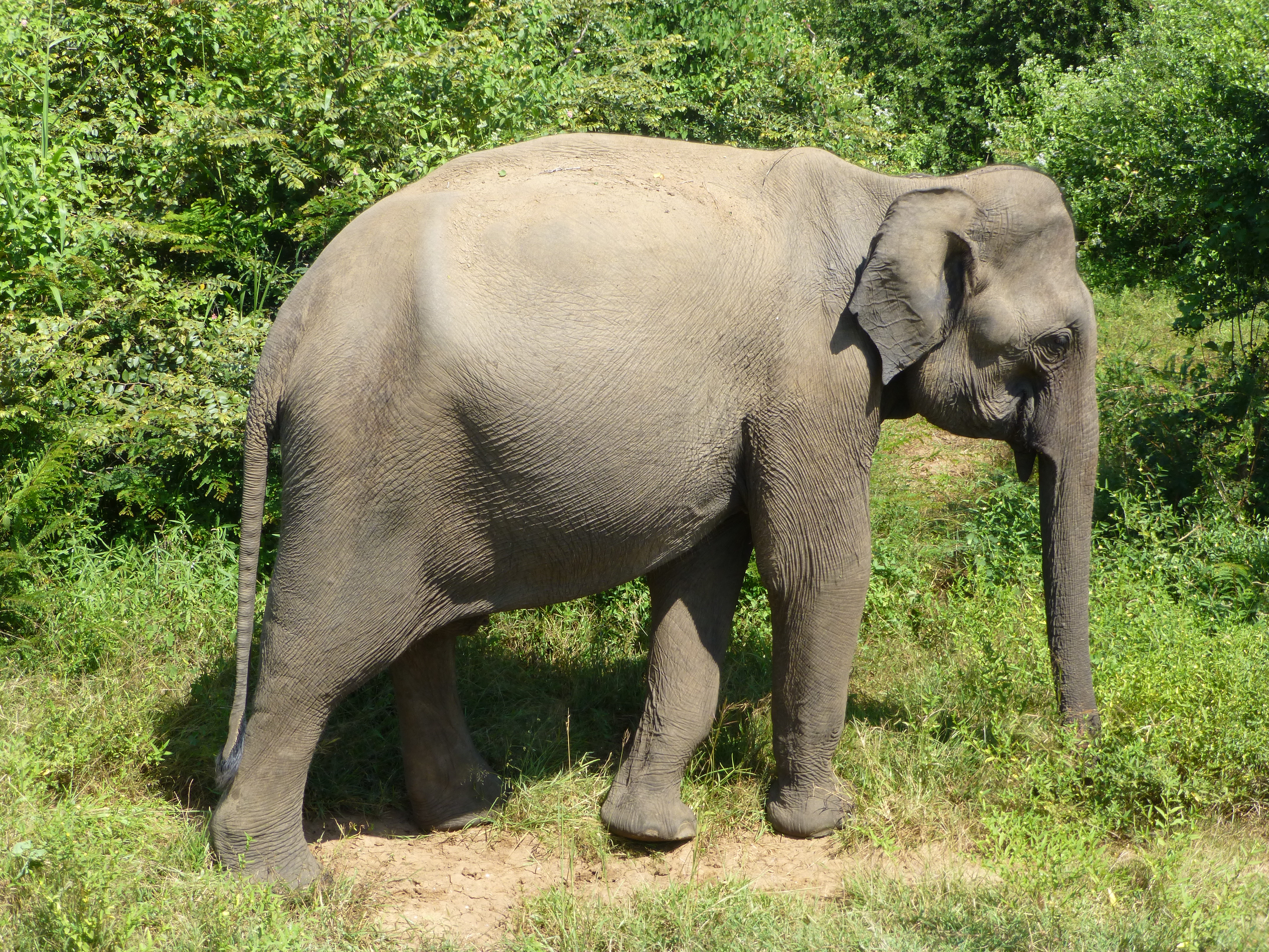 Eléphant au Uda Walawe National Park (Sri Lanka)